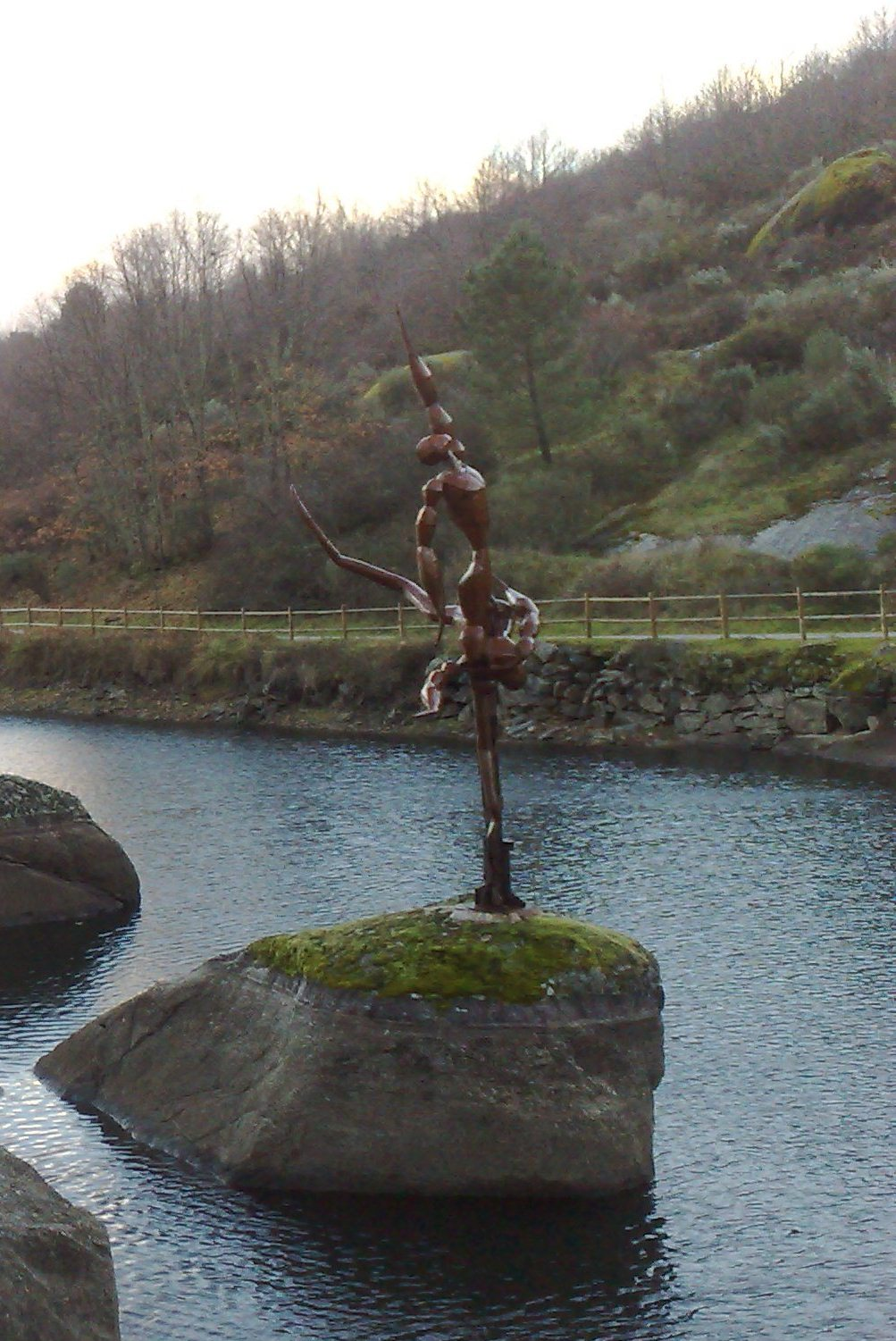 Estatua chamada "O baño de Atezina" co deus Endovelico e a deusa Atezina en Arenas de San Pedro. Obra de Fernando Sánchez Blanco